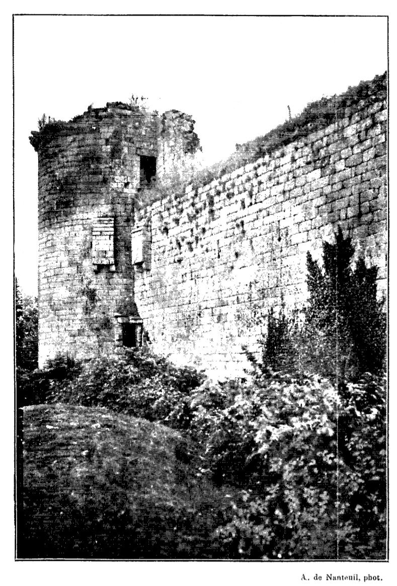 Photo de la Tour du château de Coëtfrec : Illustration de l'article d'Alfred de La Barre de Nanteuil pour le Bulletin monumental, T. 76, 1912, en face de la page 500.